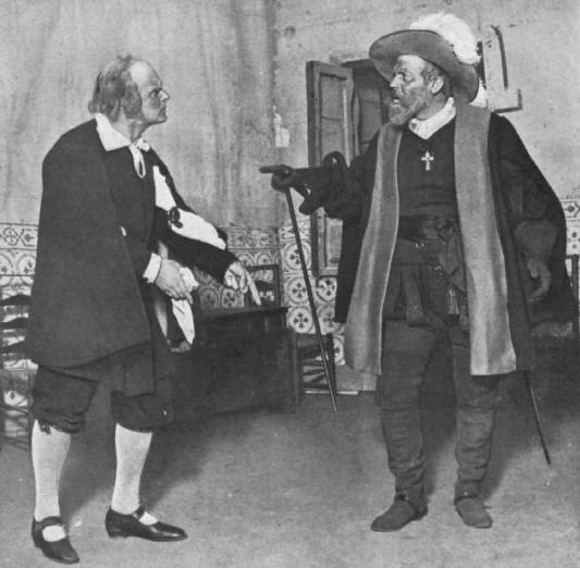 Los actores españoles Enrique Borrás y Leovigildo Ruiz Tatay en una representación de la obra de teatro El alcalde de Zalamea, de Pedro Calderón de la Barca